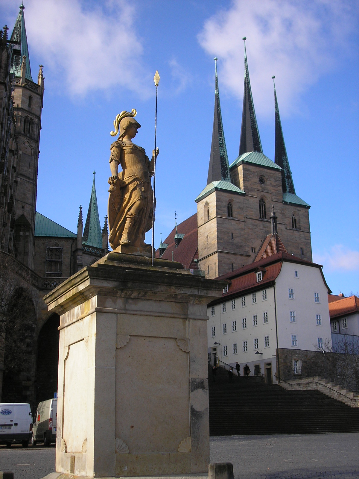 Der Minervabrunnen auf dem Domplatz in Erfurt (Thüringen).